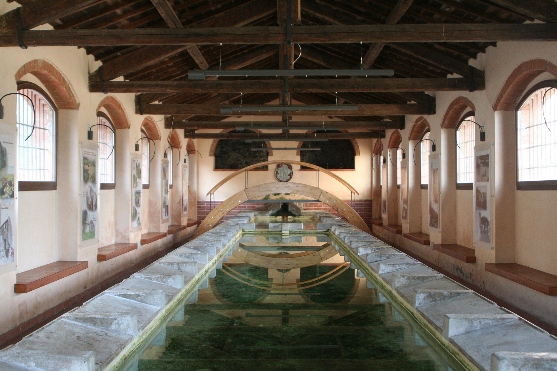 Lavatoio a Rio nell'Elba, Livorno, Toscana, Italia.